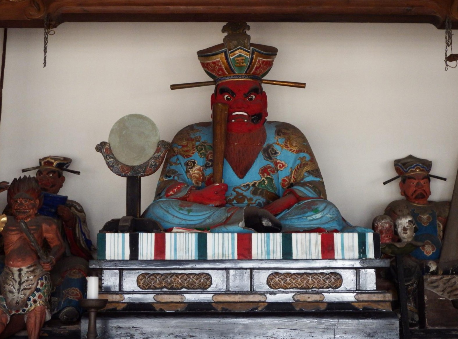 浄泉寺の閻魔堂